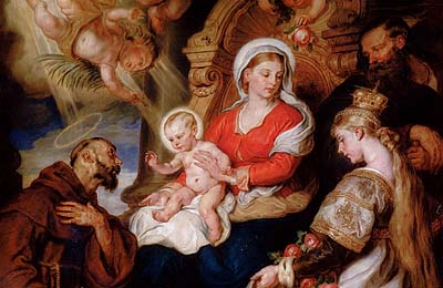 altar painting detail